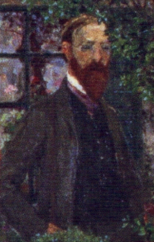 Detail aus: Sommerabend (Das Konzert). Öl auf Leinwand, 175 x 310 cm. Große Kunstschau Worpswede; Detail: Otto Modersohn